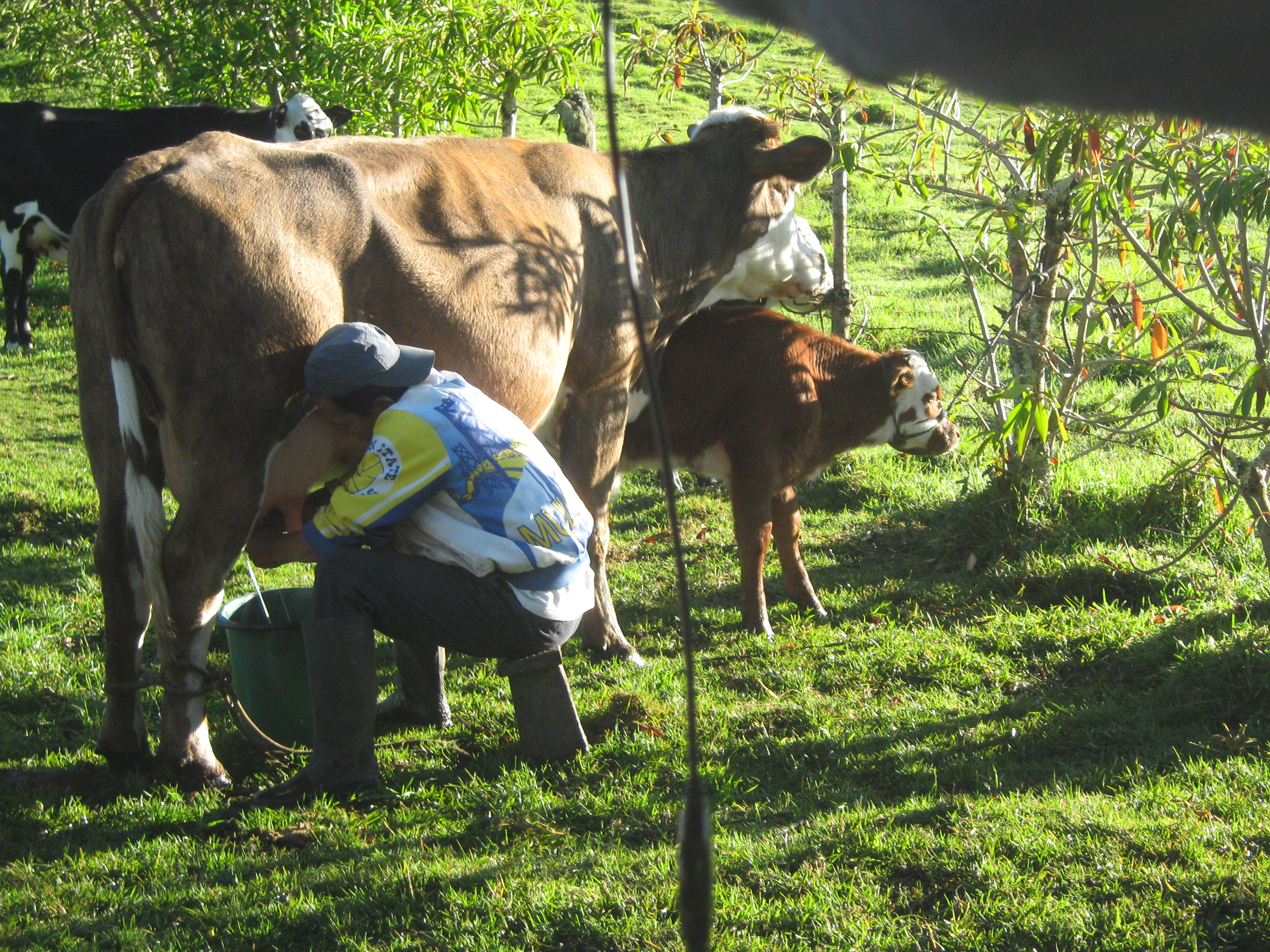 La economía de Pitayó se basa en la agricultura, la ganaderia de leche y otras actividades en un mínima proporción.